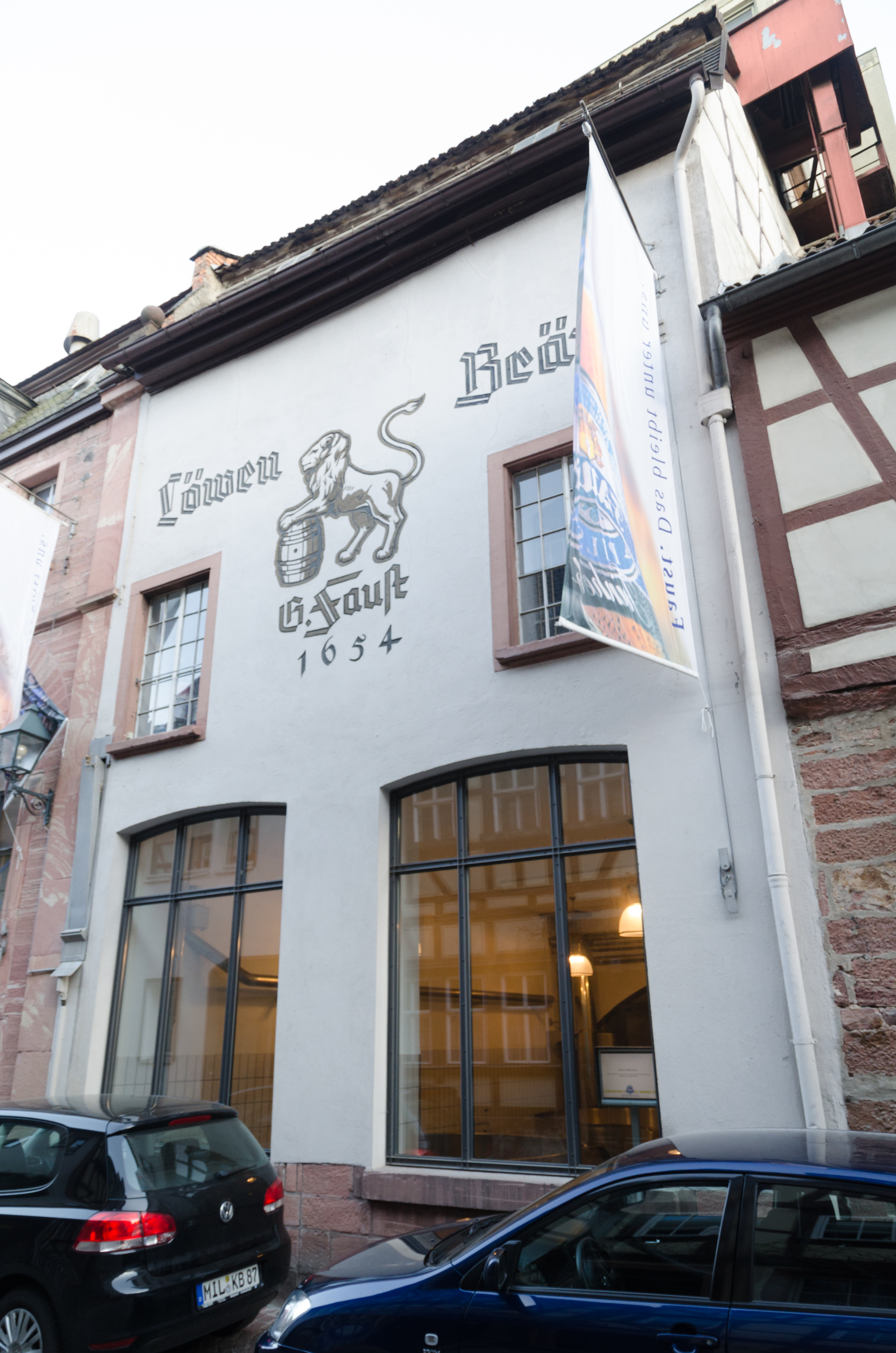 Miltenberg, Hauptstraße 219, Brauerei Faust